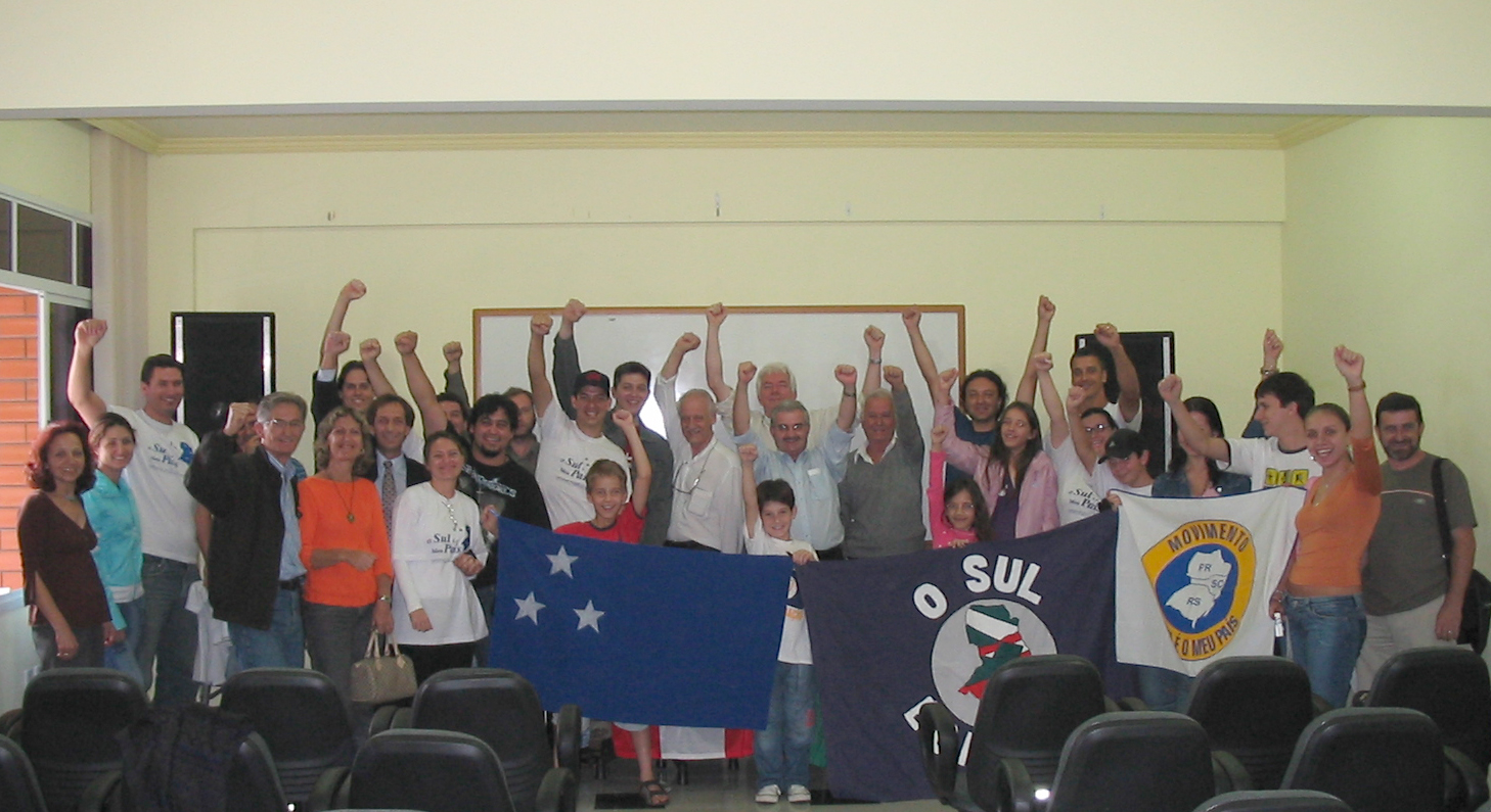 Curso de formação de líderes do movimento O Sul é o Meu País.